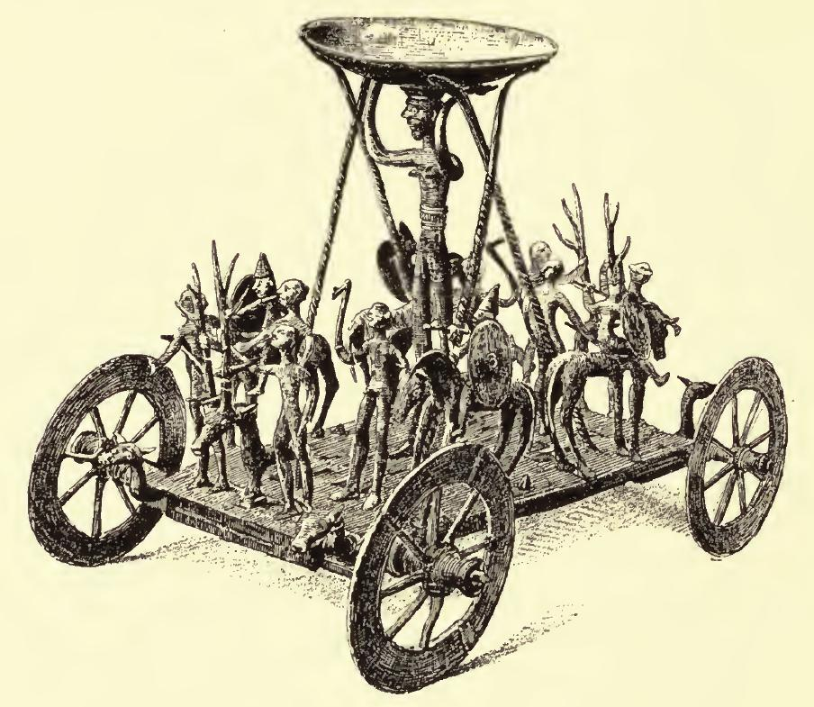 Der Strettweger Opferwagen ist ein um ca. 600 v. Chr. gefertigter bronzener Kultwagen, der 1851 beim Planieren eines Fürstengrabs der Hallstattkultur in Strettweg bei Judenburg in Österreich gefunden wurde. Neben dem Wagen wurden weitere Grabbeigaben, wie Schmuck und Amphoren aus Bronze, eiserne Waffen und Zaumzeug gefunden. Der Wagen besteht aus einer viereckigen, durchbrochenen Grundplatte mit vier Speichenrädern. Zentral auf dem Wagen steht eine etwa 32 cm hohe weibliche Gestalt, die mit erhobenen Händen einen schalenförmigen Gegenstand trägt. Neben ihr wird die Schale durch zwei scherenförmige Stützen gehalten. Auf der Schale ruht ein nahezu halbkugeliger Kessel, der von einem durchbrochenen Rand mit schneckenförmigen Verzierung abgeschlossen wird. Neben der Kesselträgerin stehen zahlreiche weitere Figuren in Form von stehenden und berittenen Menschen sowie pferde- und hirschähnlichen Tieren. Die dargestellte Szene wird als Opferszene interpretiert. Der Wagen diente vermutlich als Kultobjekt, zur Aufnahme von Trankopfern. Der Strettweger Opferwagen wurde 2009 restauriert und steht im Original im Universalmuseum Joanneum in Graz. Eine Kopie ist im Museum Judenburg ausgestellt.